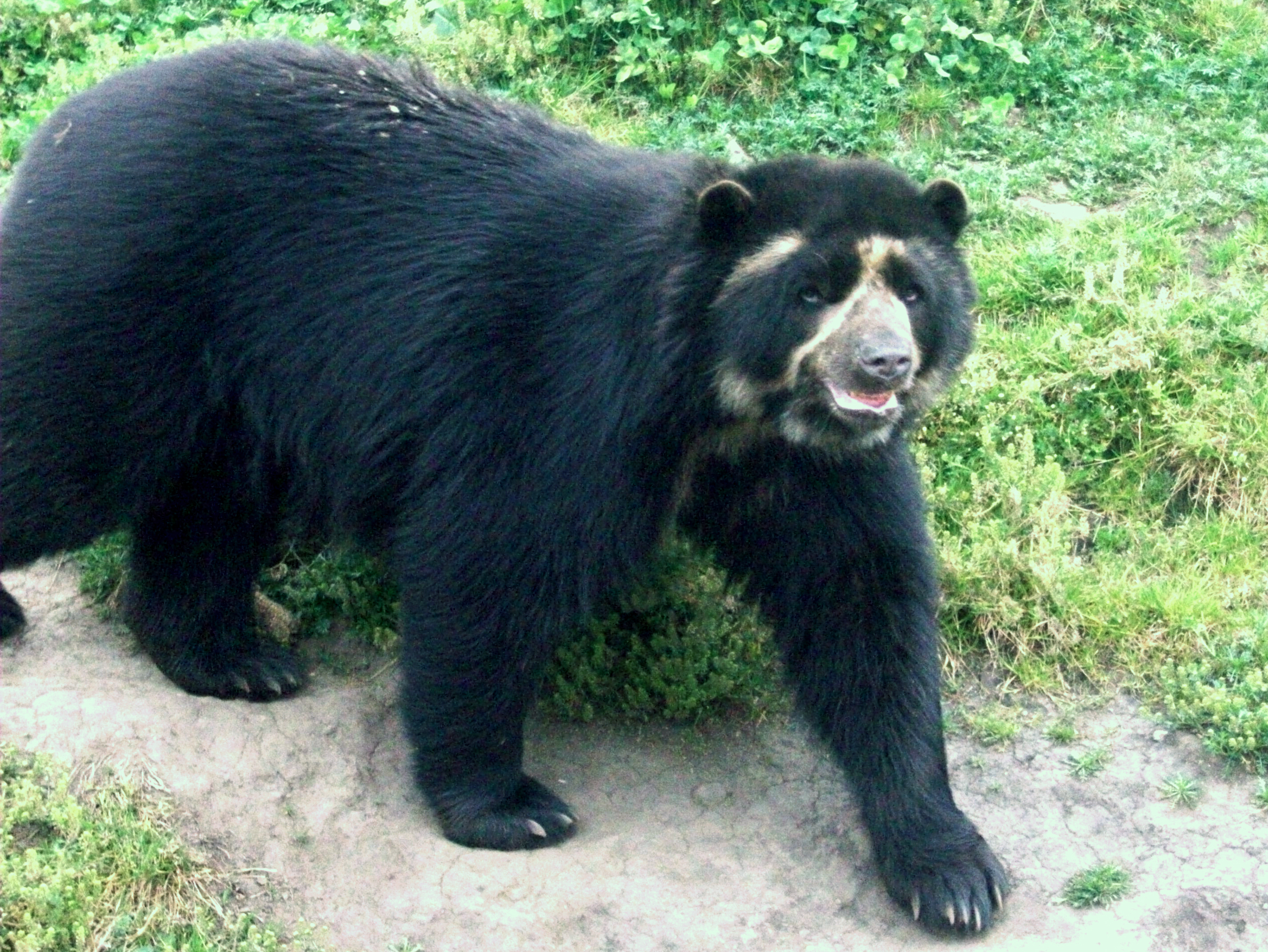 Oso de anteojos u oso andino en el Parque Nacional de Cutervo en Cajamarca, Perú.